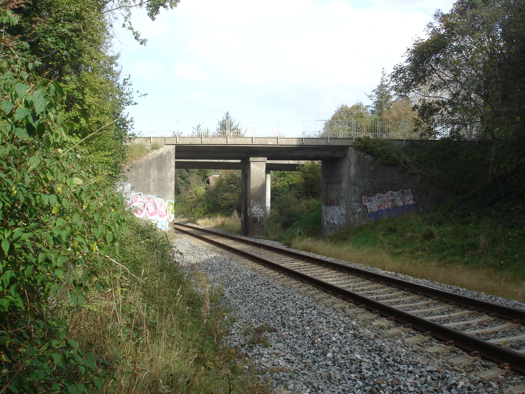 Hørbybanens bro over Aalborgbanen i Hjørring, set fra nord